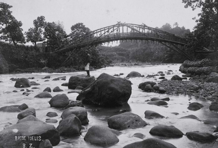 Foto. Brug over een rivier bij Batoe Toelis